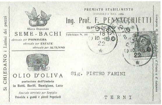 Cartolina pubblicitaria della ditta Stabilimento Bacologico Pennacchietti viaggiata nel 1922